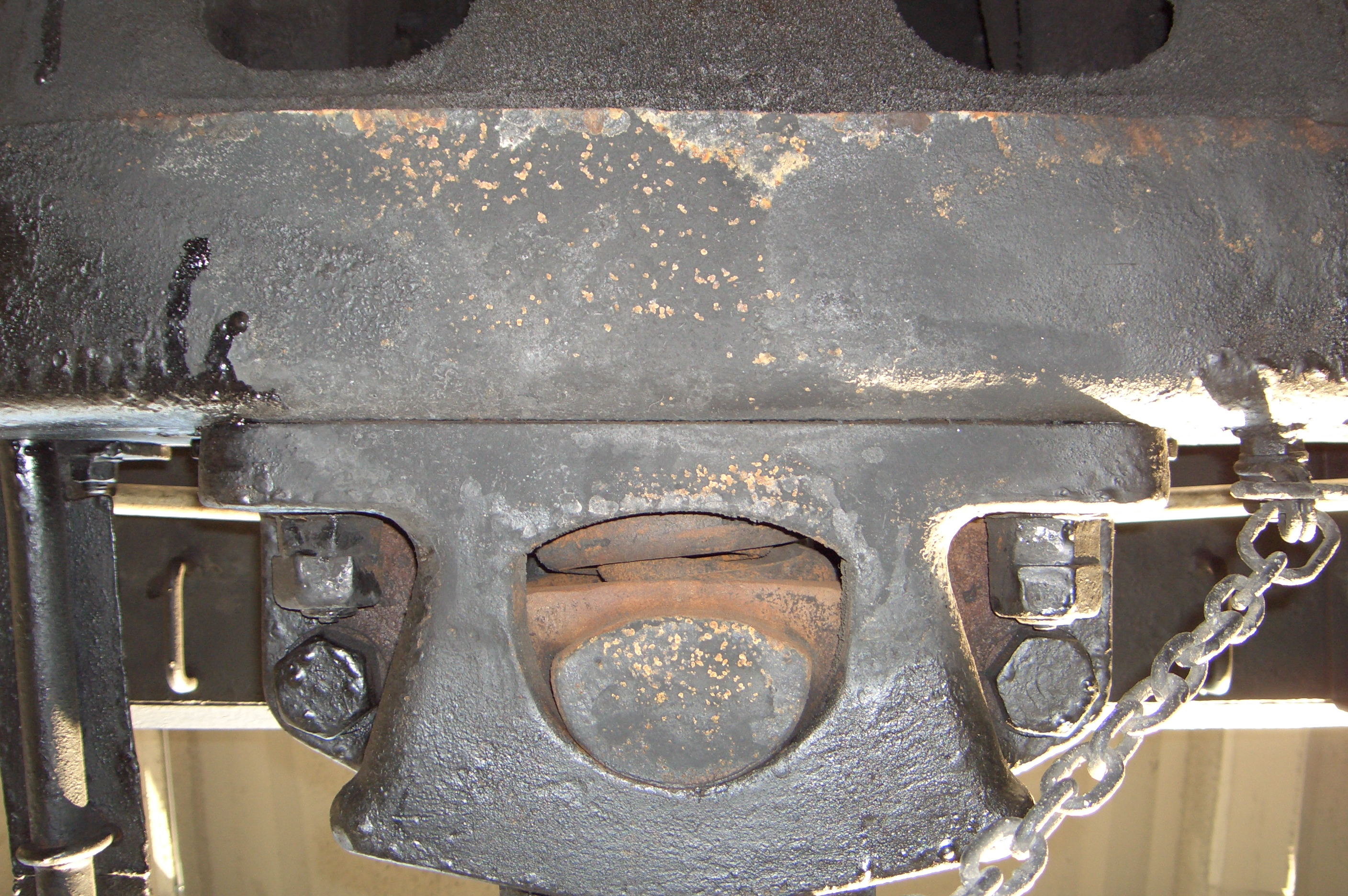 日本国有鉄道 D52468 連結器、梅小路蒸気機関車館にて撮影